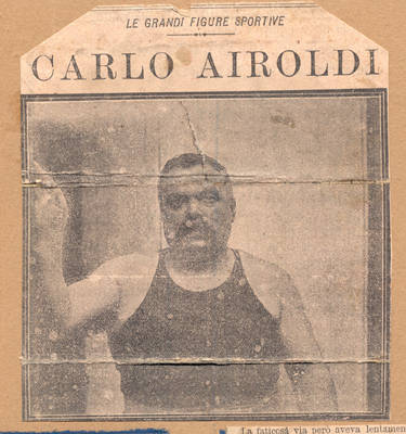 Le grandi figurine sportive - Carlo Airoldi